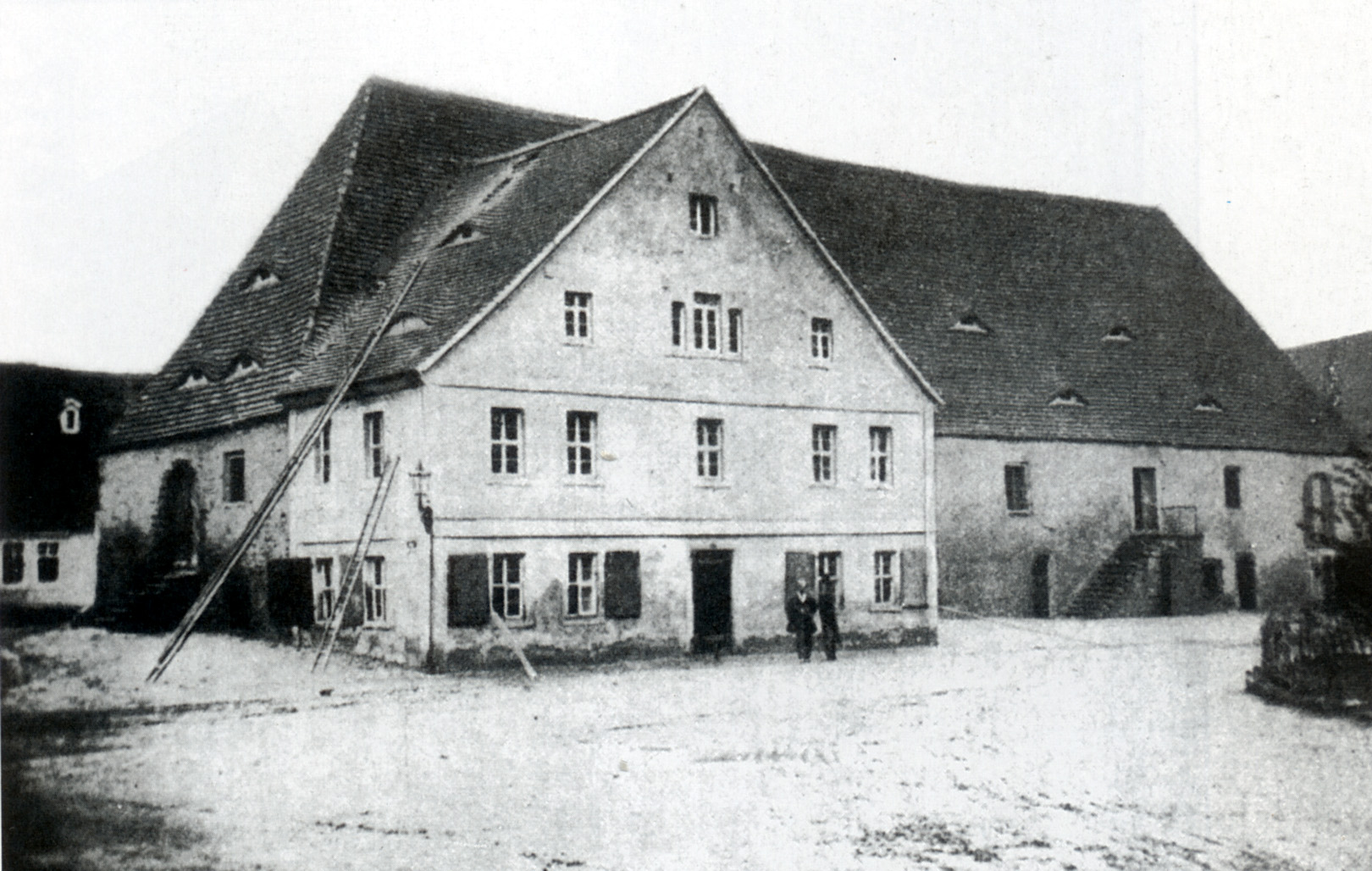 Bernburg, ehemaliges Neustädter Rathaus (später fürstliches "Provianthaus") vor seinem Abriss in der zweiten Hälfte des 19. Jahrhunderts